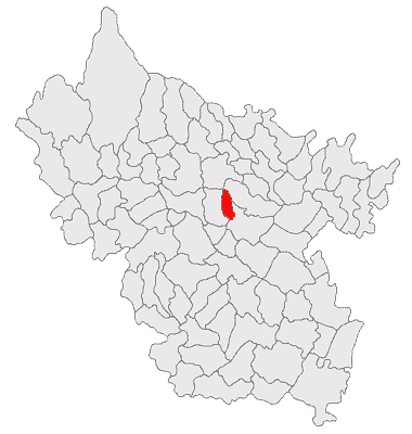 Categorie:Hărţi ale judeţului Buzău